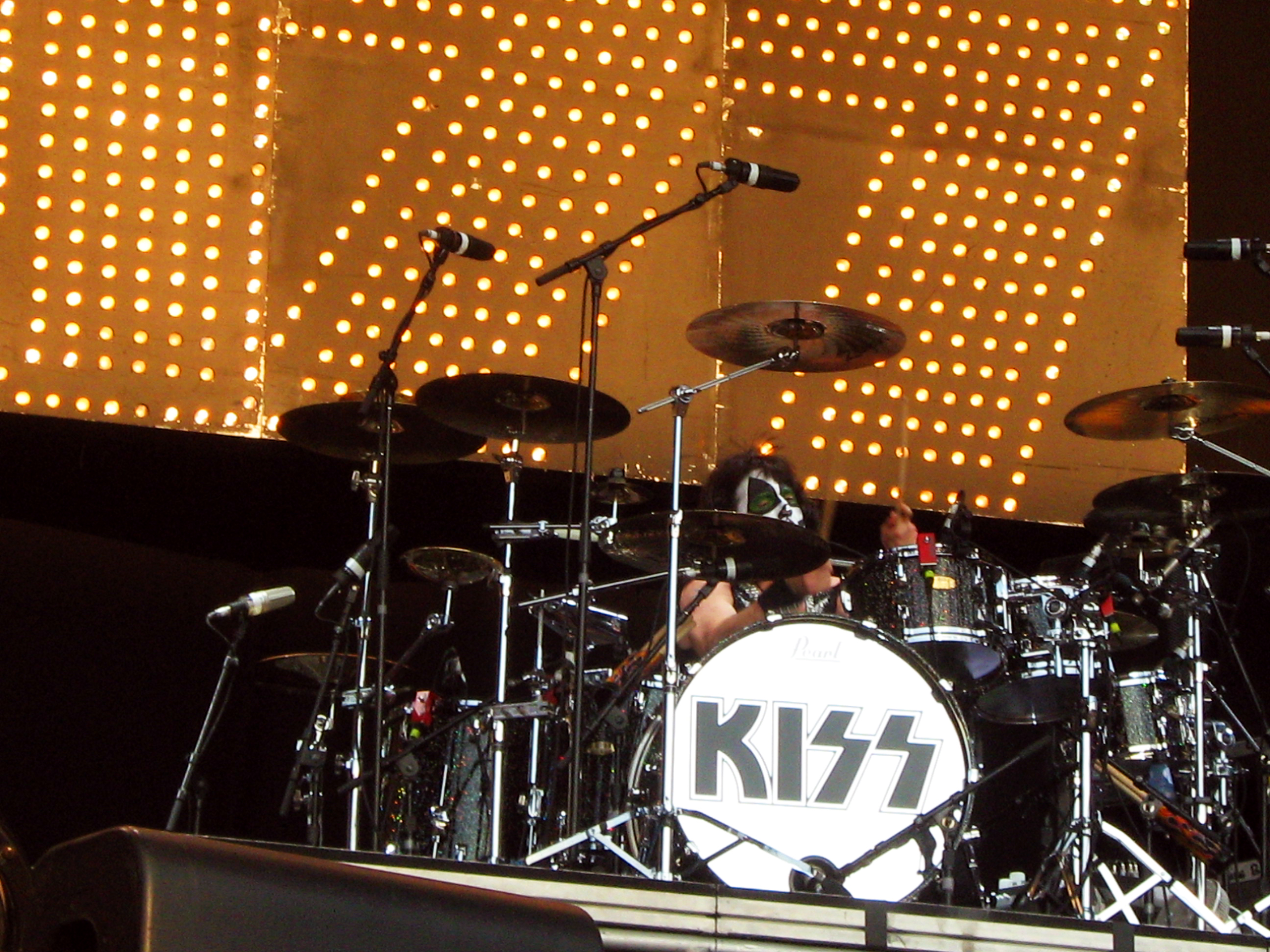 Eric Singer - Nijmegen 2008